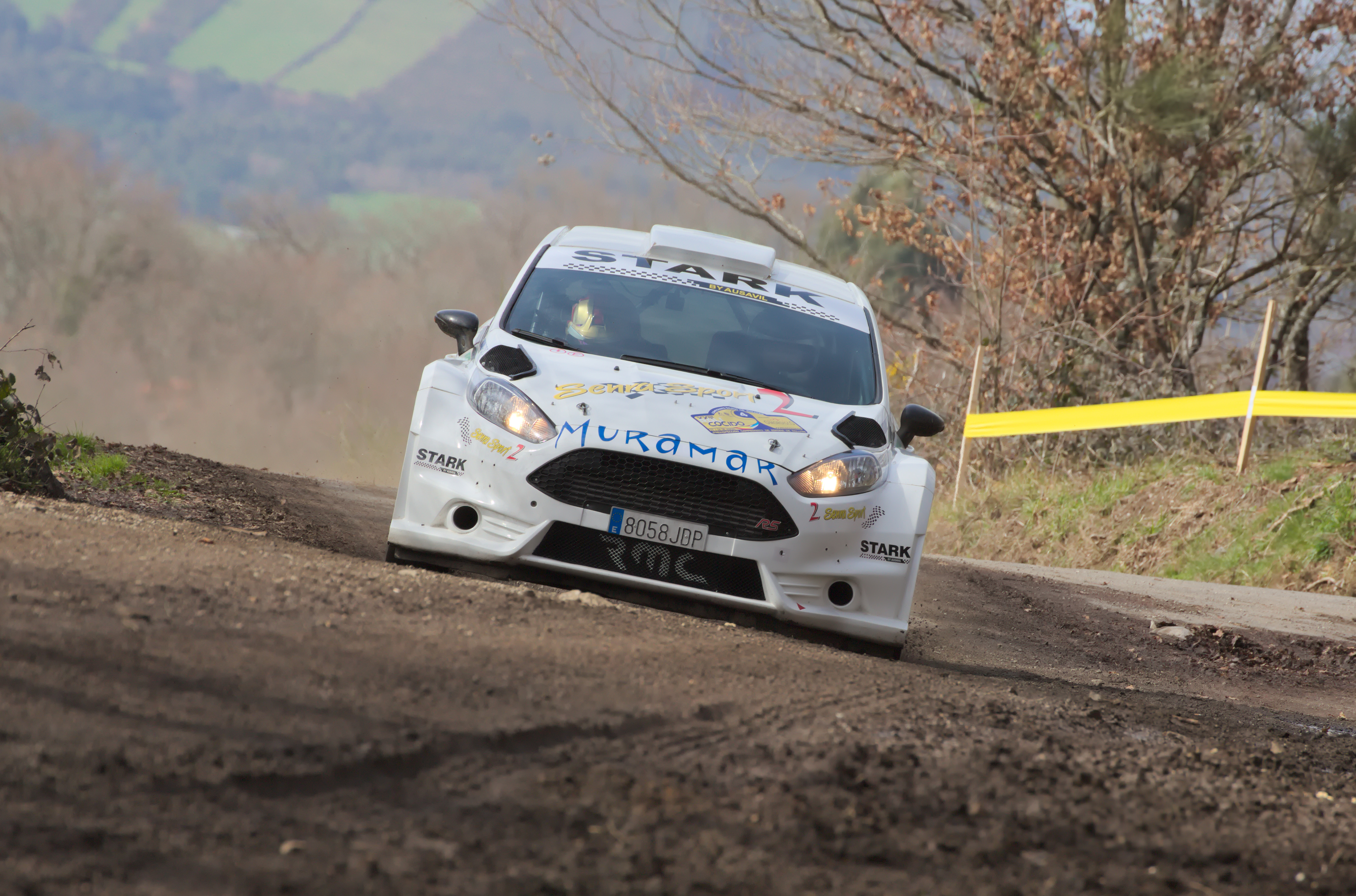 Víctor Senra - Ford Fiesta R5